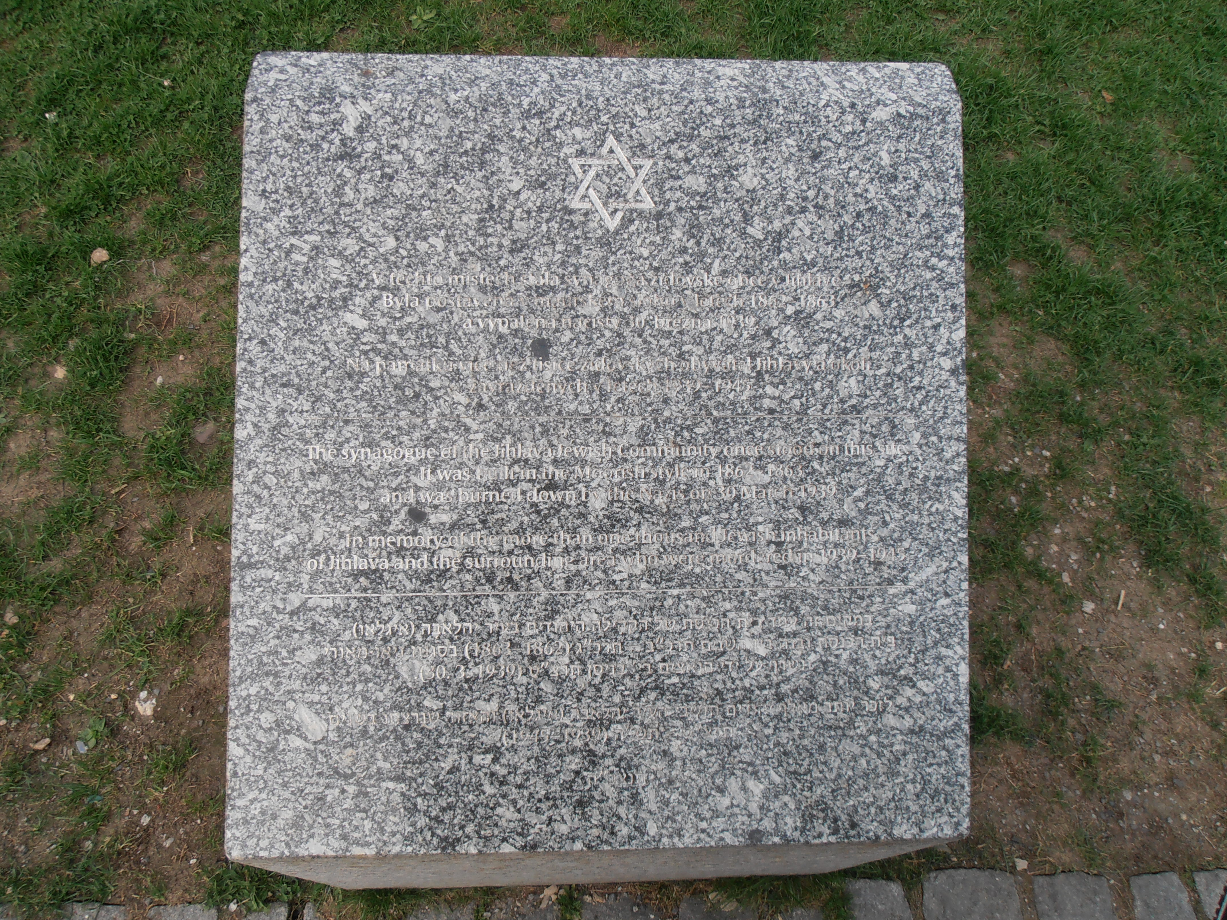 Kámen připomínající jihlavskou synagogu.